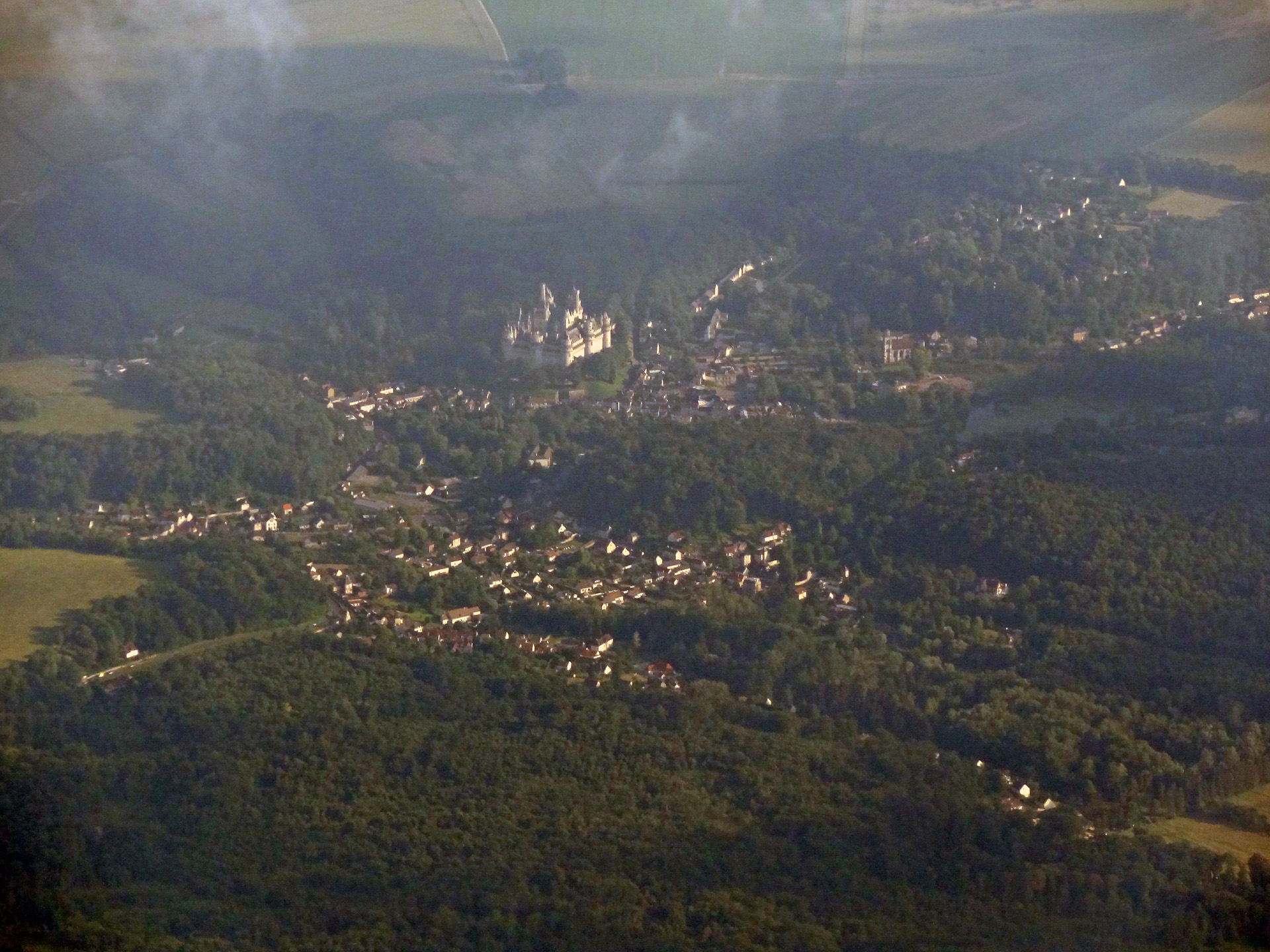 Vue aérienne de Pierrefonds (Oise), France.